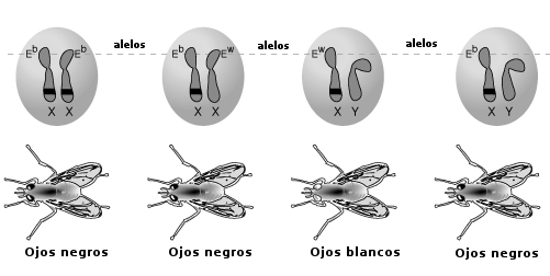 Determinación del color de ojos en Drosophila